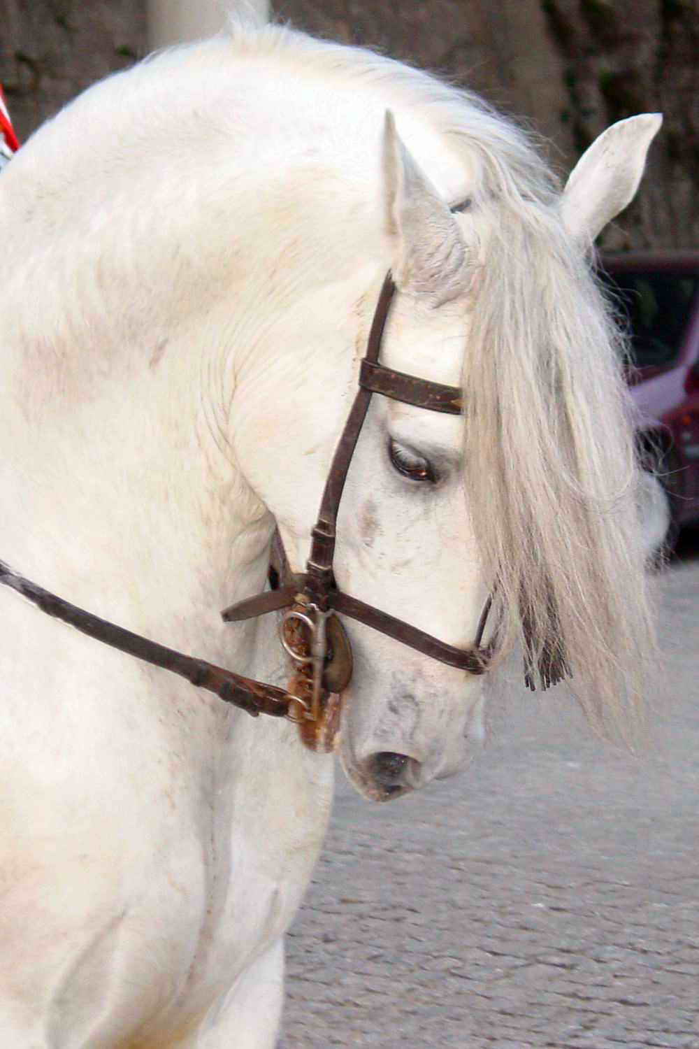 Cabalo en Bastabales - Galicia - Spain